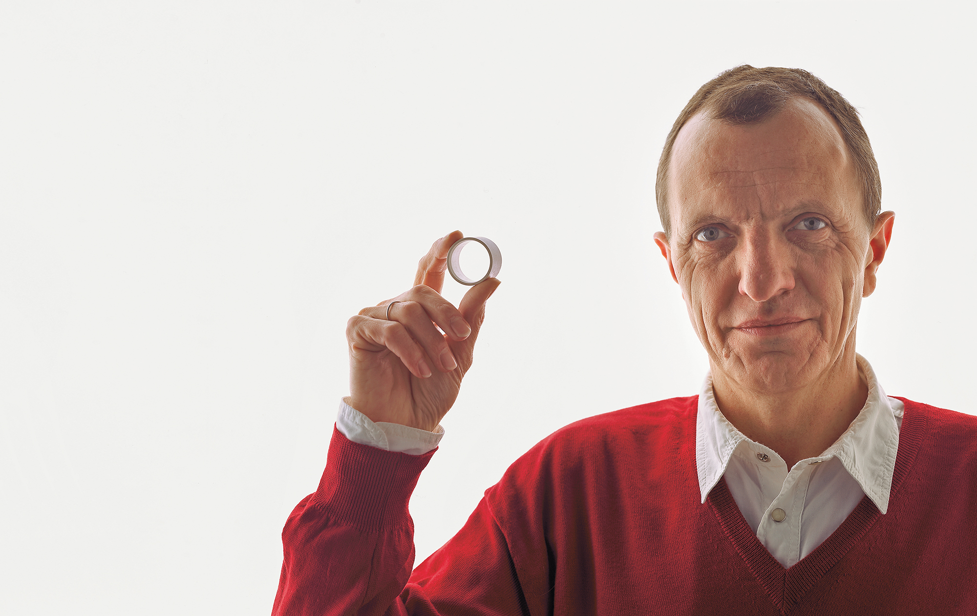 Burkhardt Leitner hält den Verbindungsknoten des Ausstellungssystems "Primus"